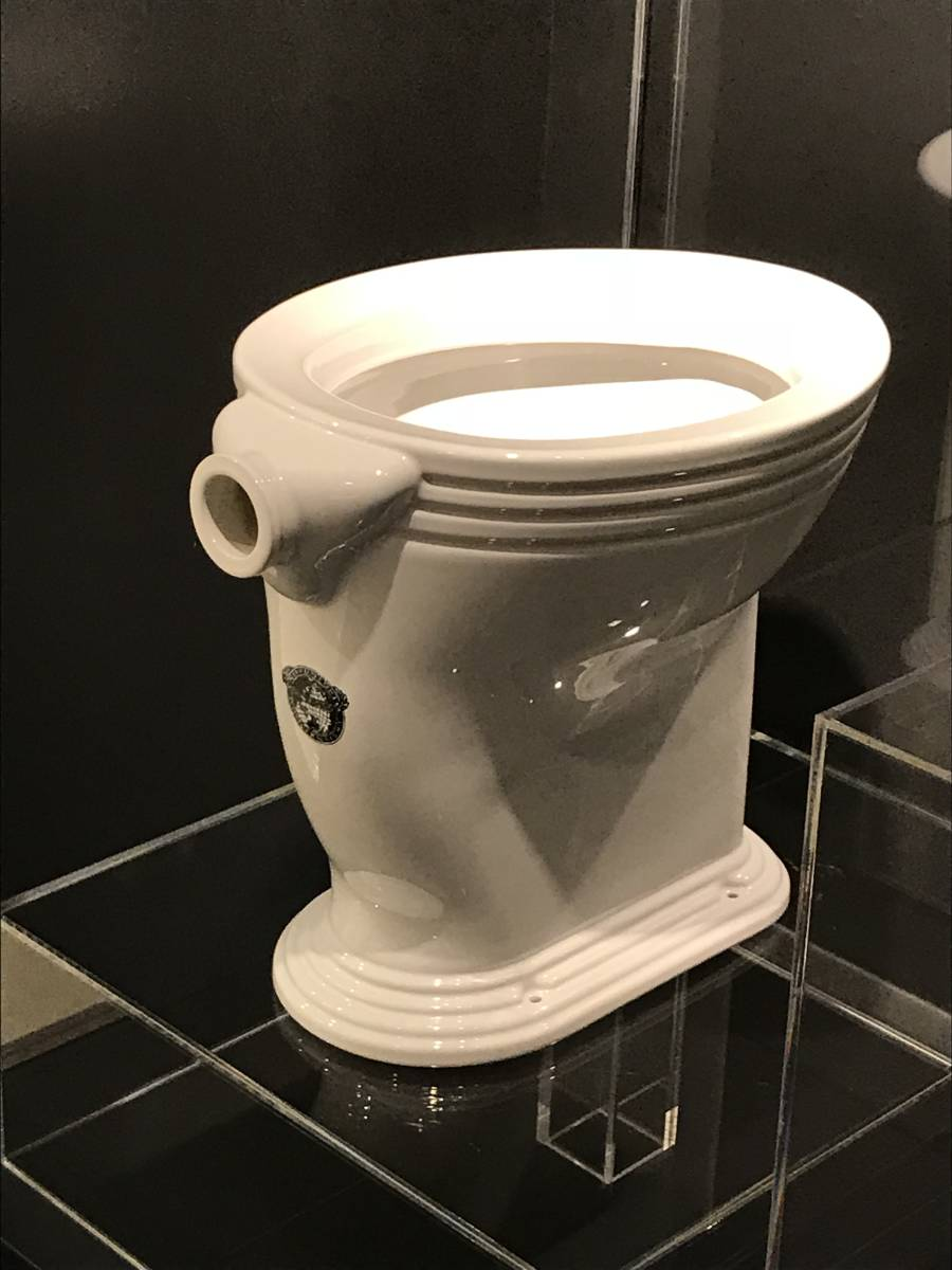 TOTO-10